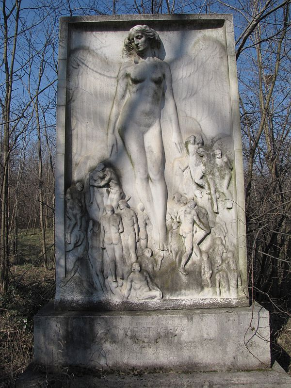 Maróti Géza (Rintel Géza) (Barsvörösvár, 1875. március 1. – Budapest, 1941. május 6.) építész, szobrász, festő, iparművész sírja Budapesten. Kerepesi temető: 32-1-3 [szobrász: Maróti Géza].